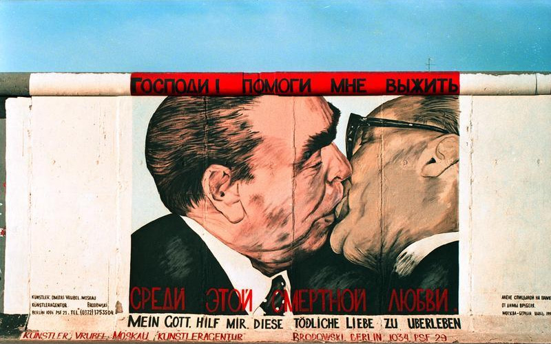 25.7.1991 "East-Side-Gallery", gelegen zwischen der Jannowitzbrücke und der Oberbaumbrücke. Reste der Berliner Mauer, die nach der Öffnung von vorwiegend ostdeutschen Künstlern auf der Ost-Seite bemalt wurden.